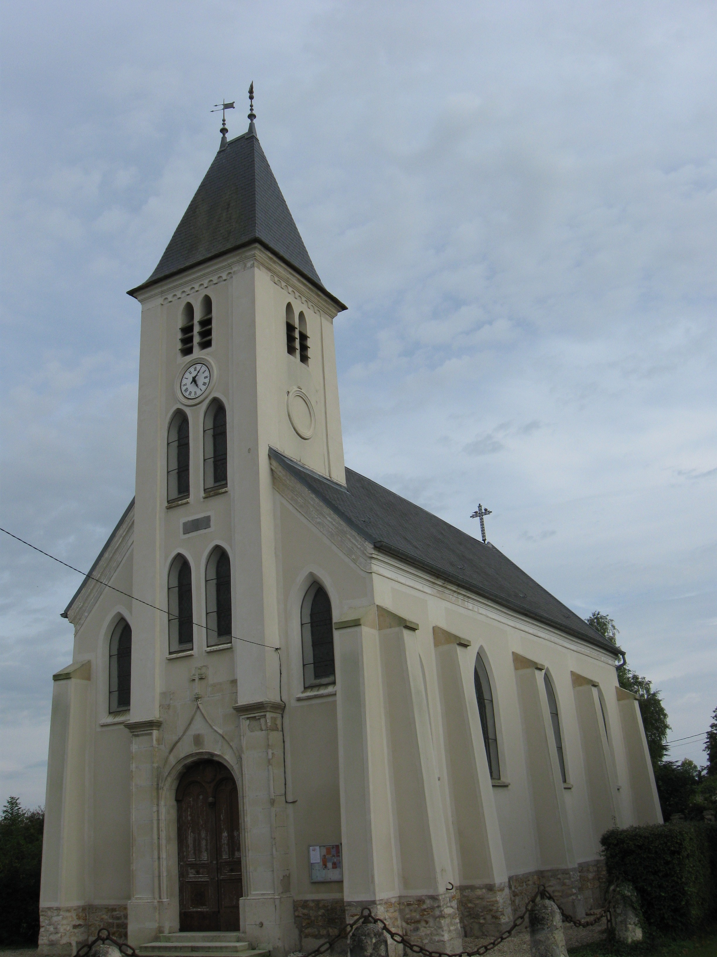 Église Saint-Nicolas de Le Plessis-aux-Bois. (Seine-et-Marne, région Île-de-France).